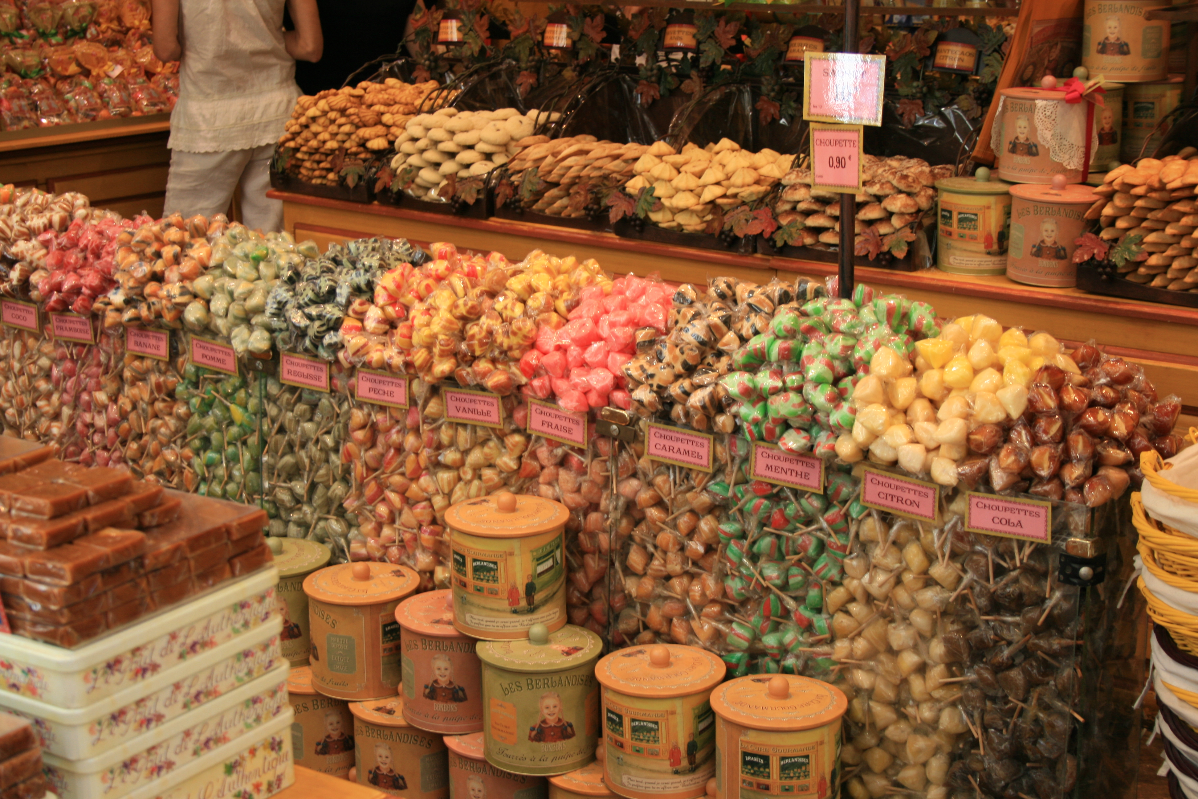 Bonbon acidulé en forme de gros berlingot appelé chique, choupette ou pégueux